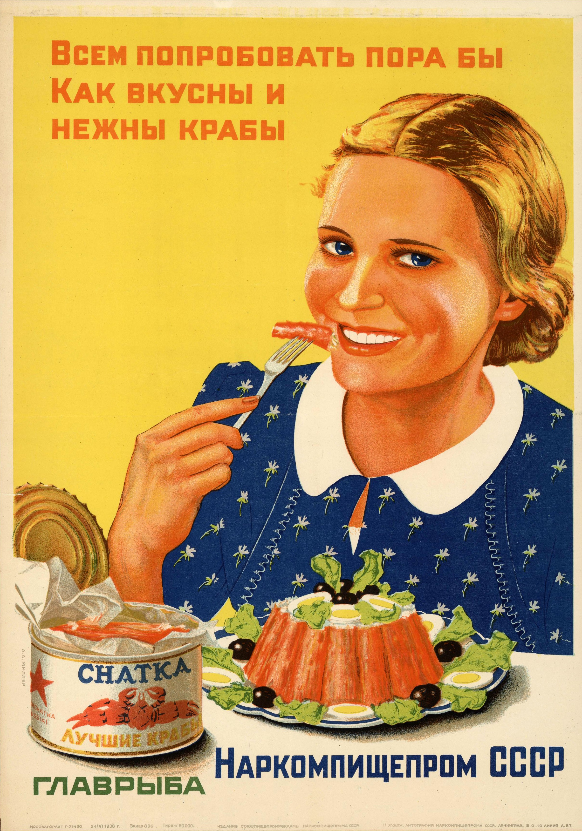 Рекламный плакат Наркомпищепрома СССР «Всем попробовать пора бы как вкусны и нежны крабы». Москва : Союзпищепромреклама, 1938. Цветная литография, 1 лист, 60×42 см, 50 000 экз.